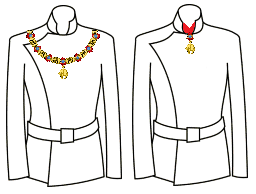 Modo di indossare le decorazioni dell'Ordine del Toson d'Oro (Sacro Romano Impero)